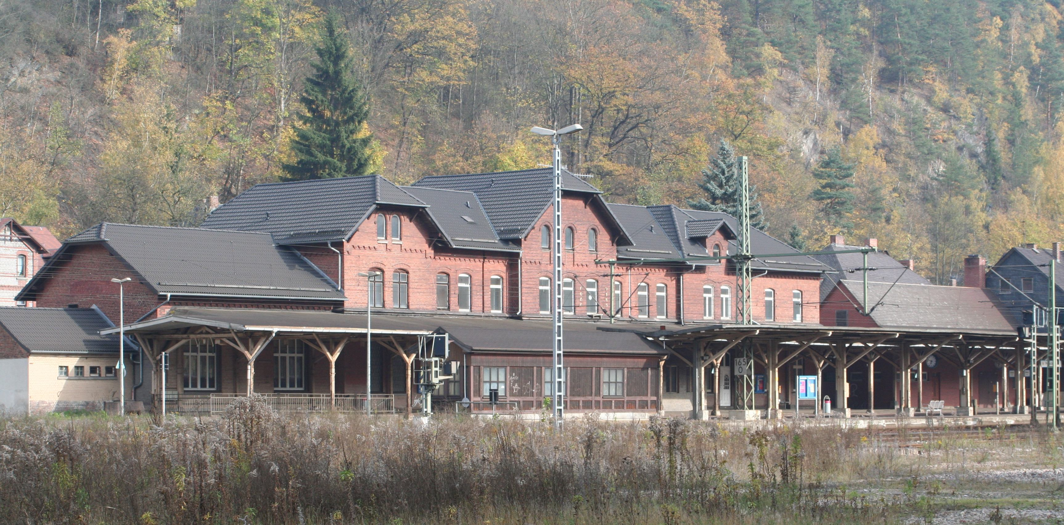 Bahnhof Probstzella in Südthüringen